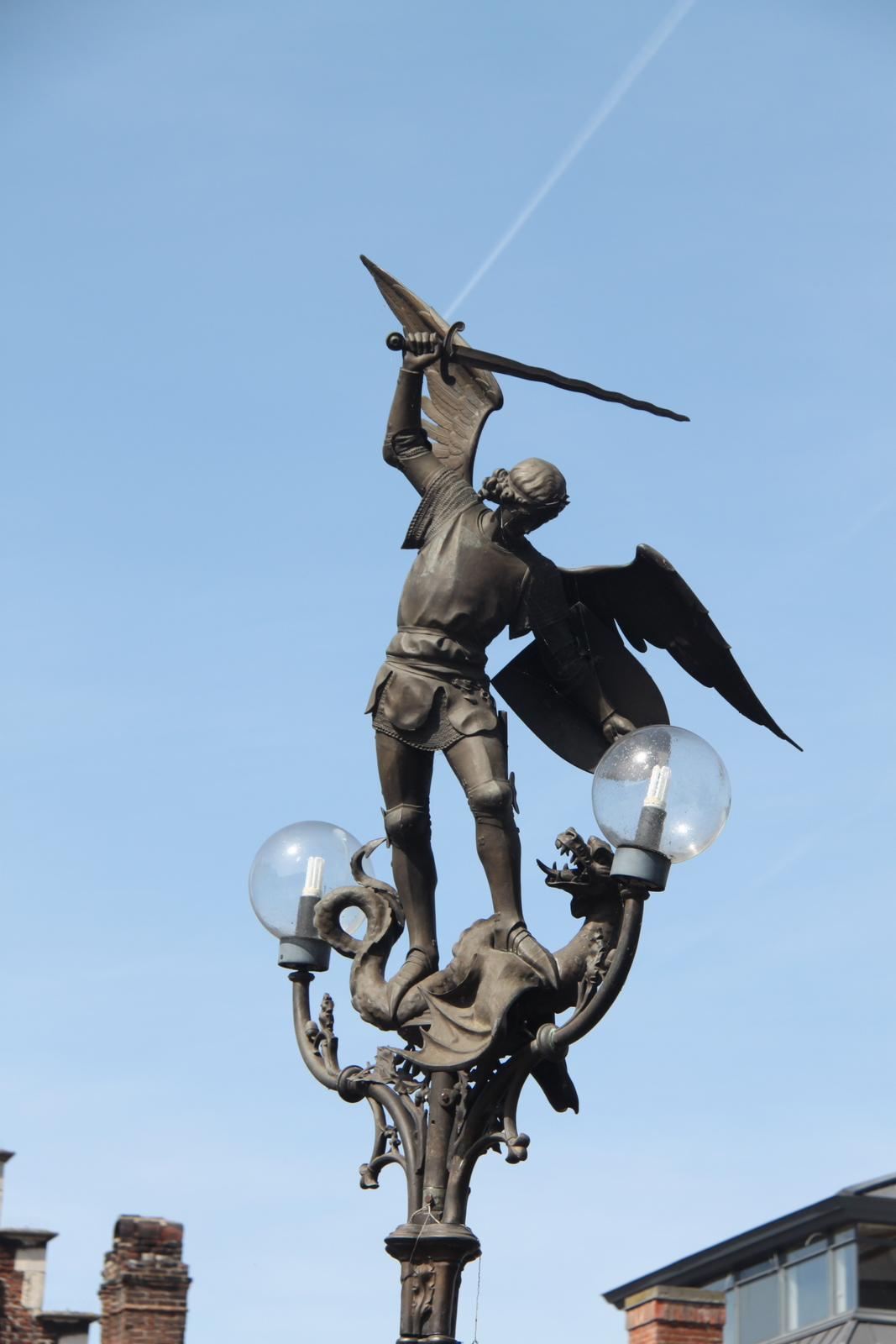 Ghent, Belgium on 2011-04-10